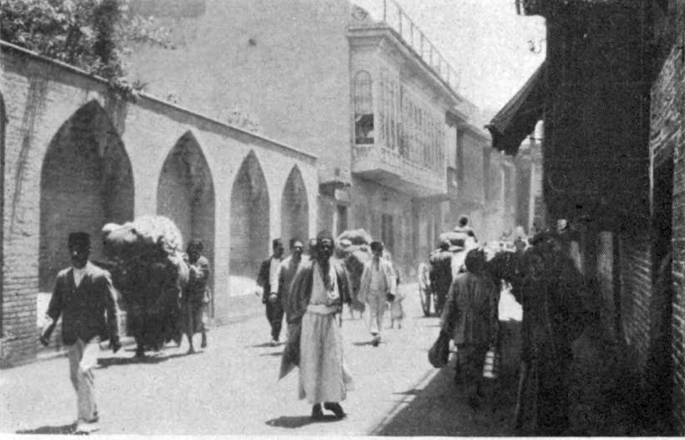 Baghdad, Iraq